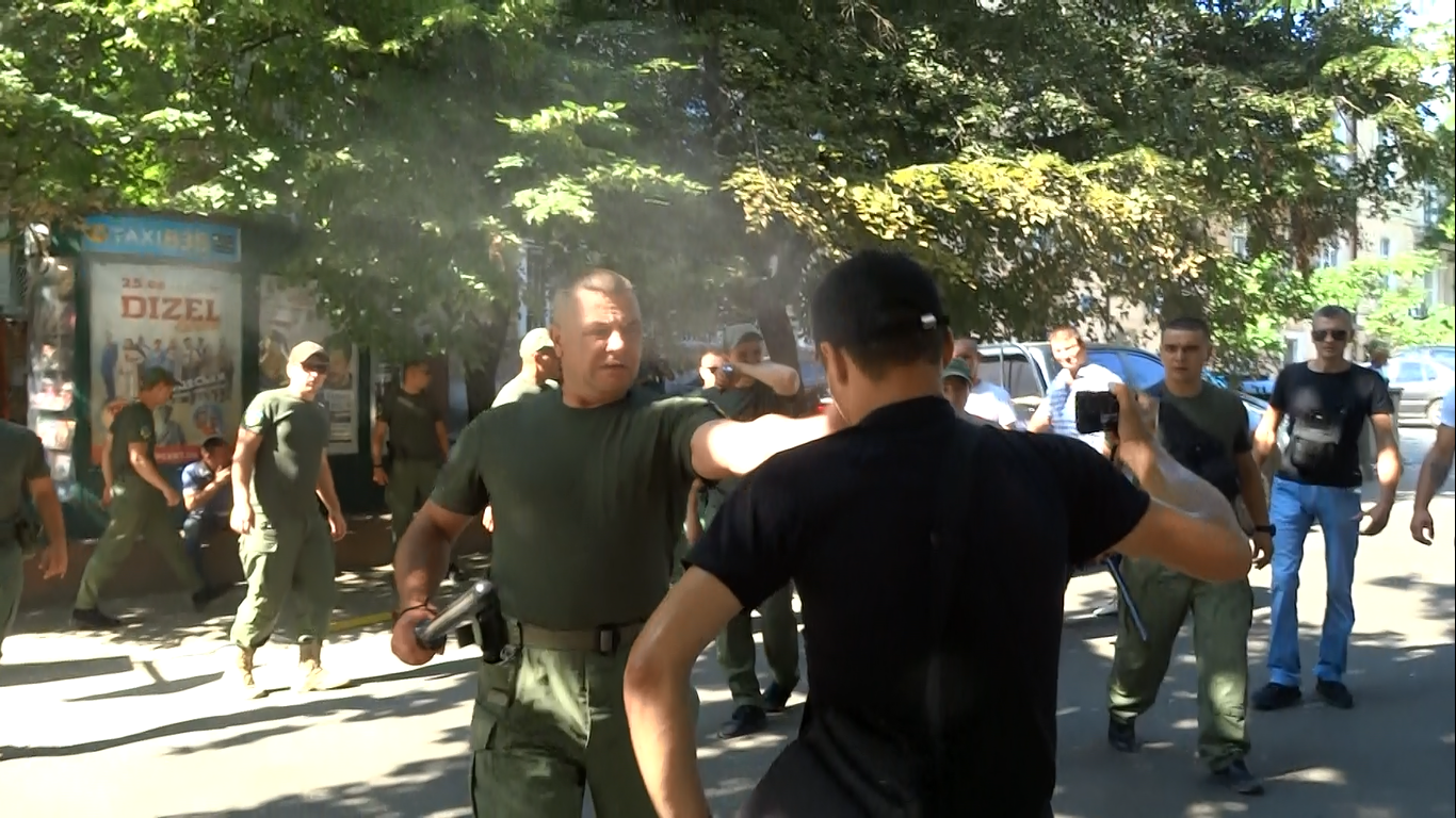 Стоп-кадр сделанный из моего видео с места где КП "Муниципальная охрана", действующая от имени городского совета Одессы, проводит демонтаж сооружений, избивая адвокатов и журналистов